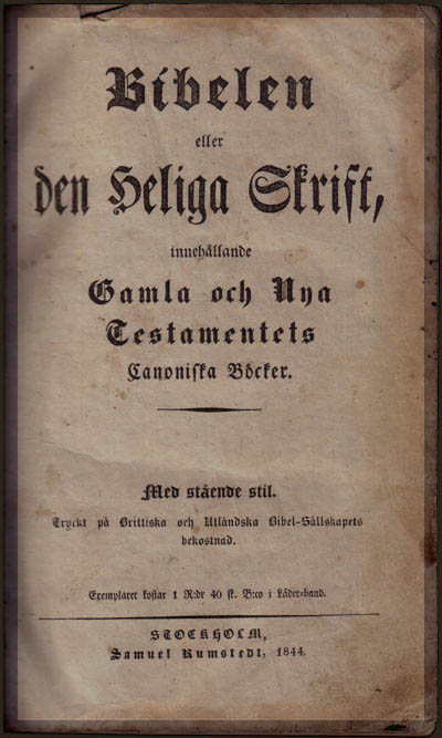 Inscannat titelblad från Karl XII:s Bibel 1844